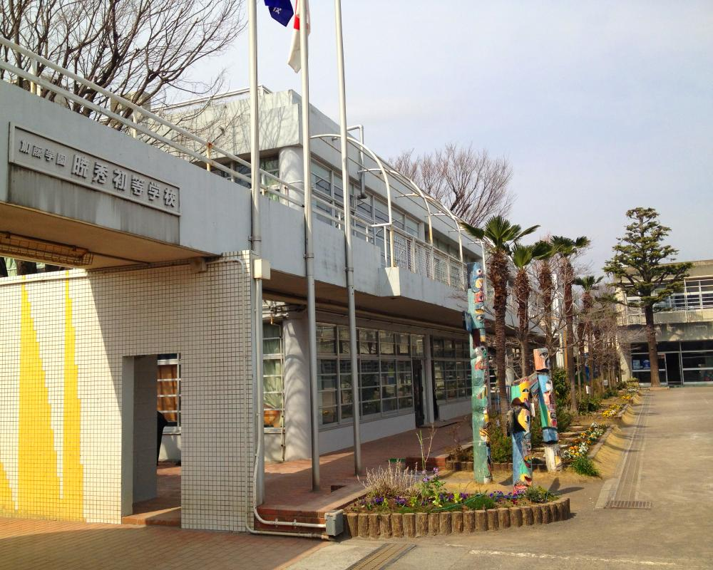 初等学校本館南面を、南から北を見た全景